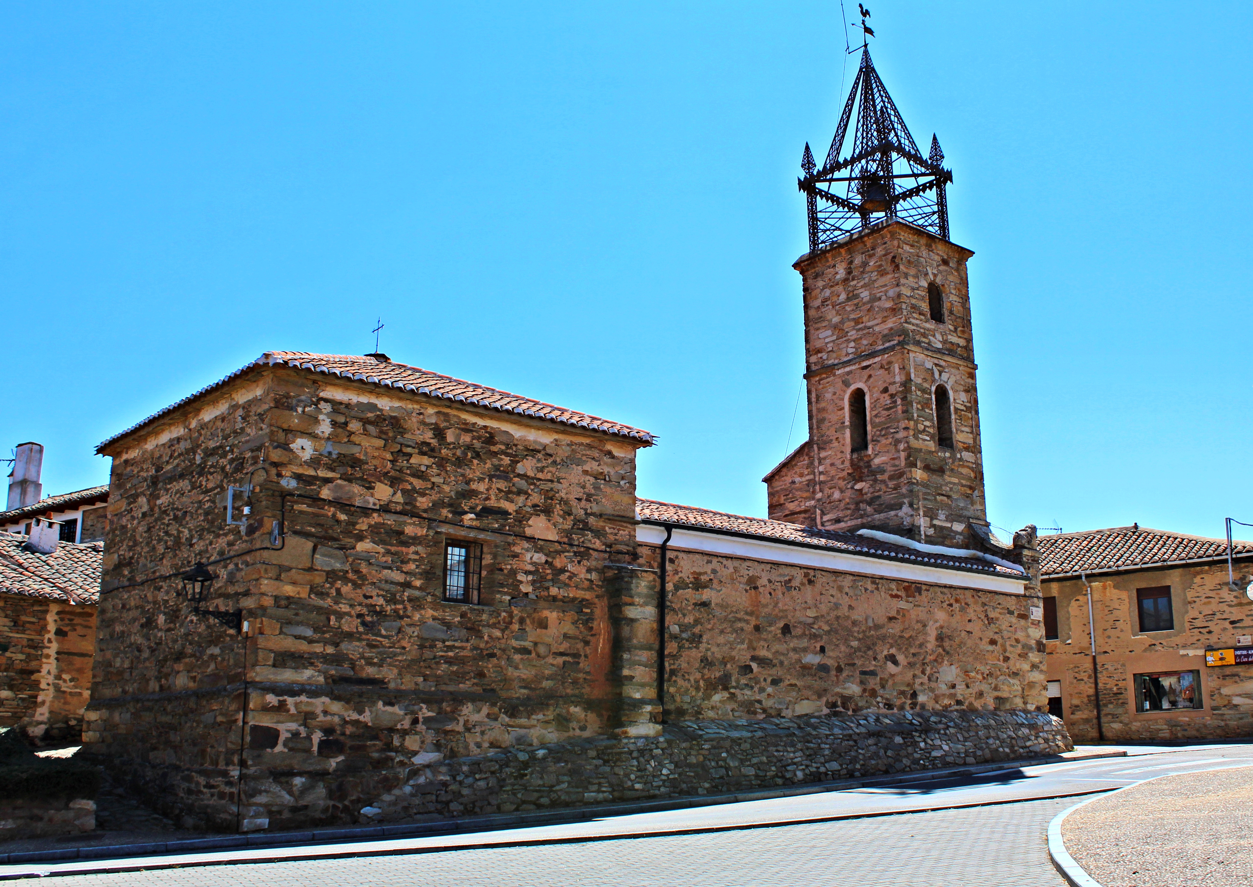 Val de San Lorenzo, la Maragatería, provincia de León.